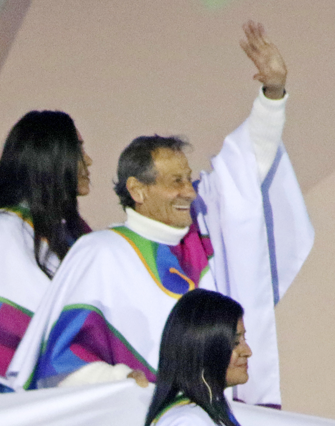 Ceremonia de inauguración de los Juegos Panamericanos Lima 2019